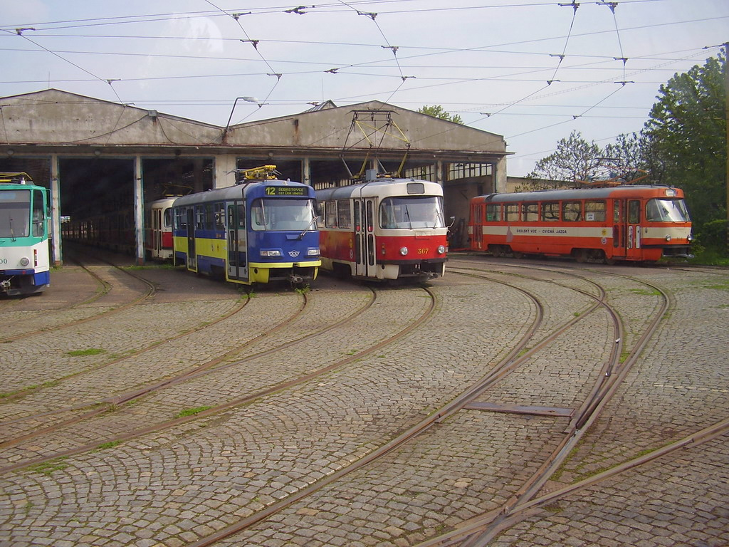 Košické električky T3/Košice T3 trams. Created by Sheep, 6.5.2006